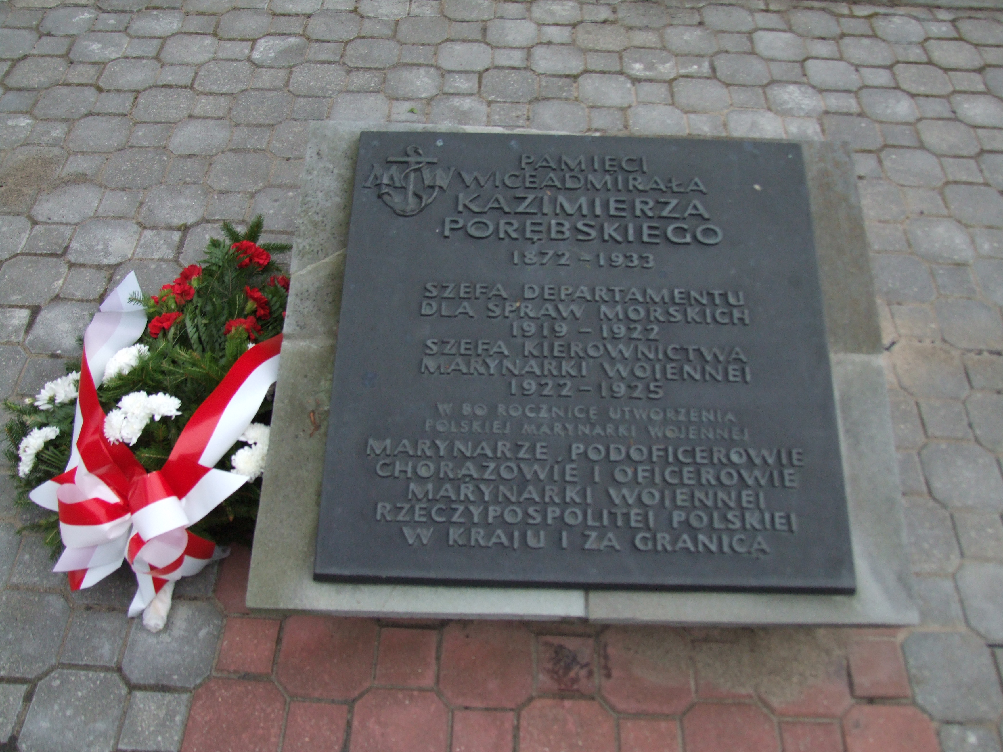 Gdynia-Oksywie Cmentarz Marynarki Wojennej